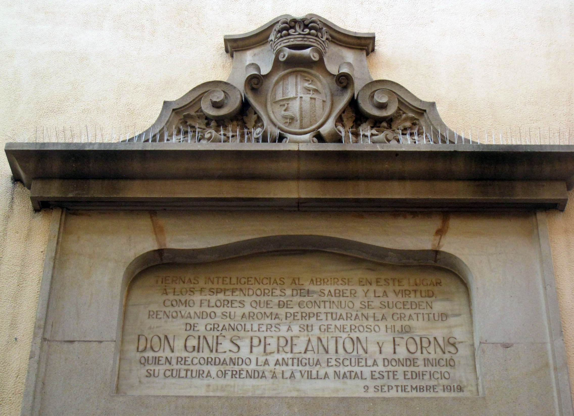 Col·legi Pereanton (Granollers) Object location41° 36′ 32.98″ N, 2° 17′ 17.32″ E